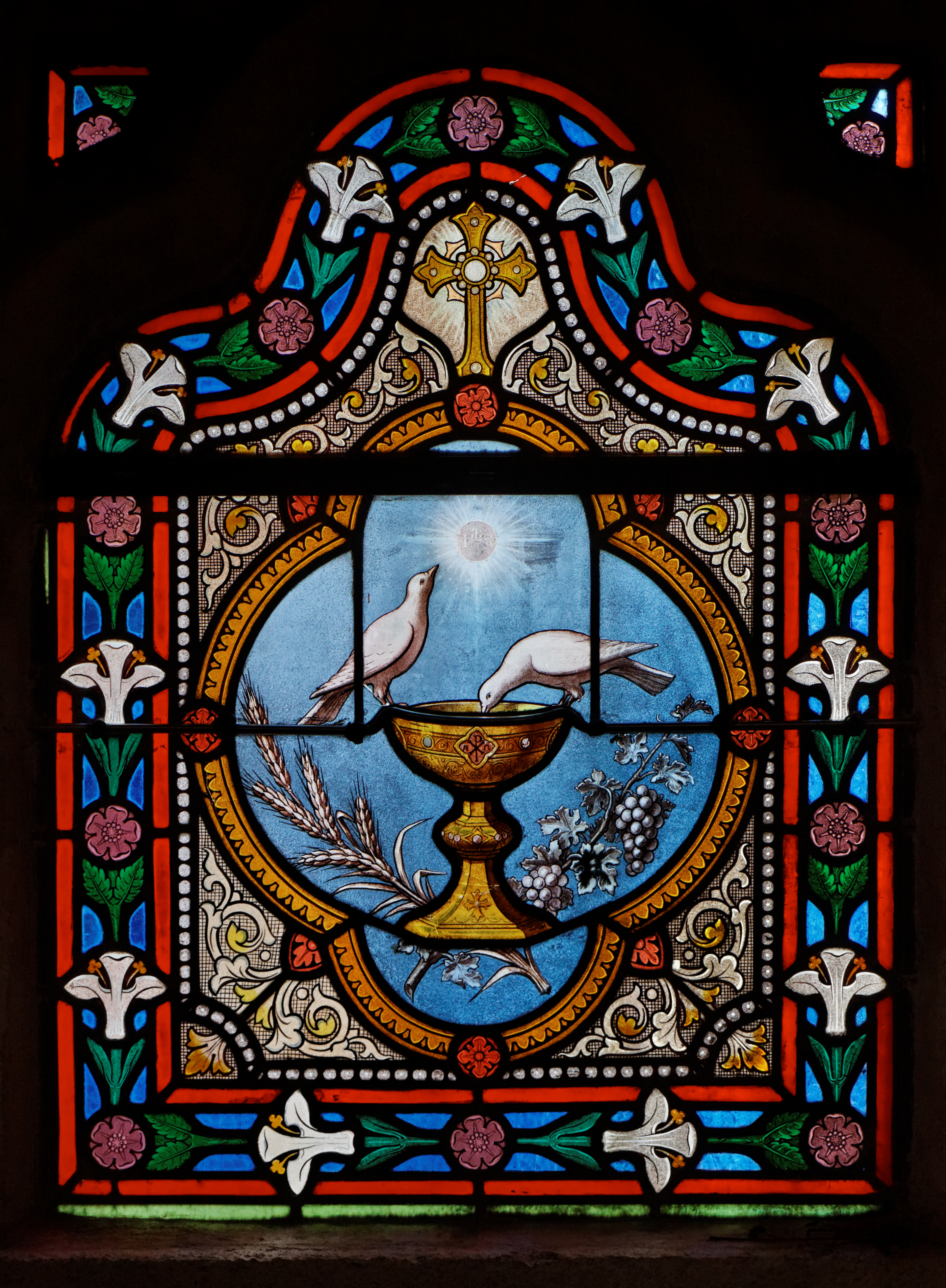 La cathédrale Saint-Corentin à Quimper dans le Finistère.